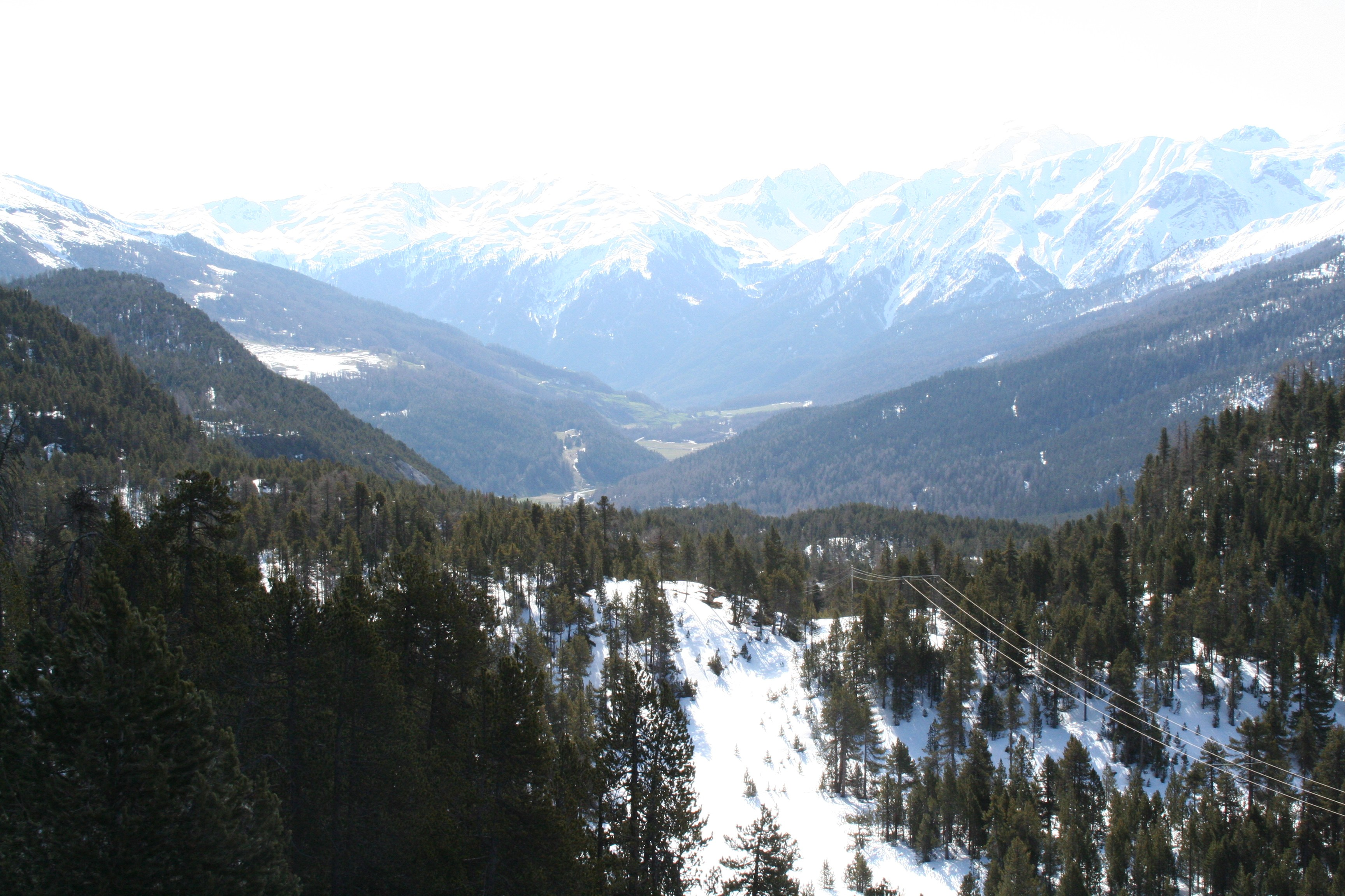 Das Münstertal Richtung Süden unterhalb des Ofenpasses